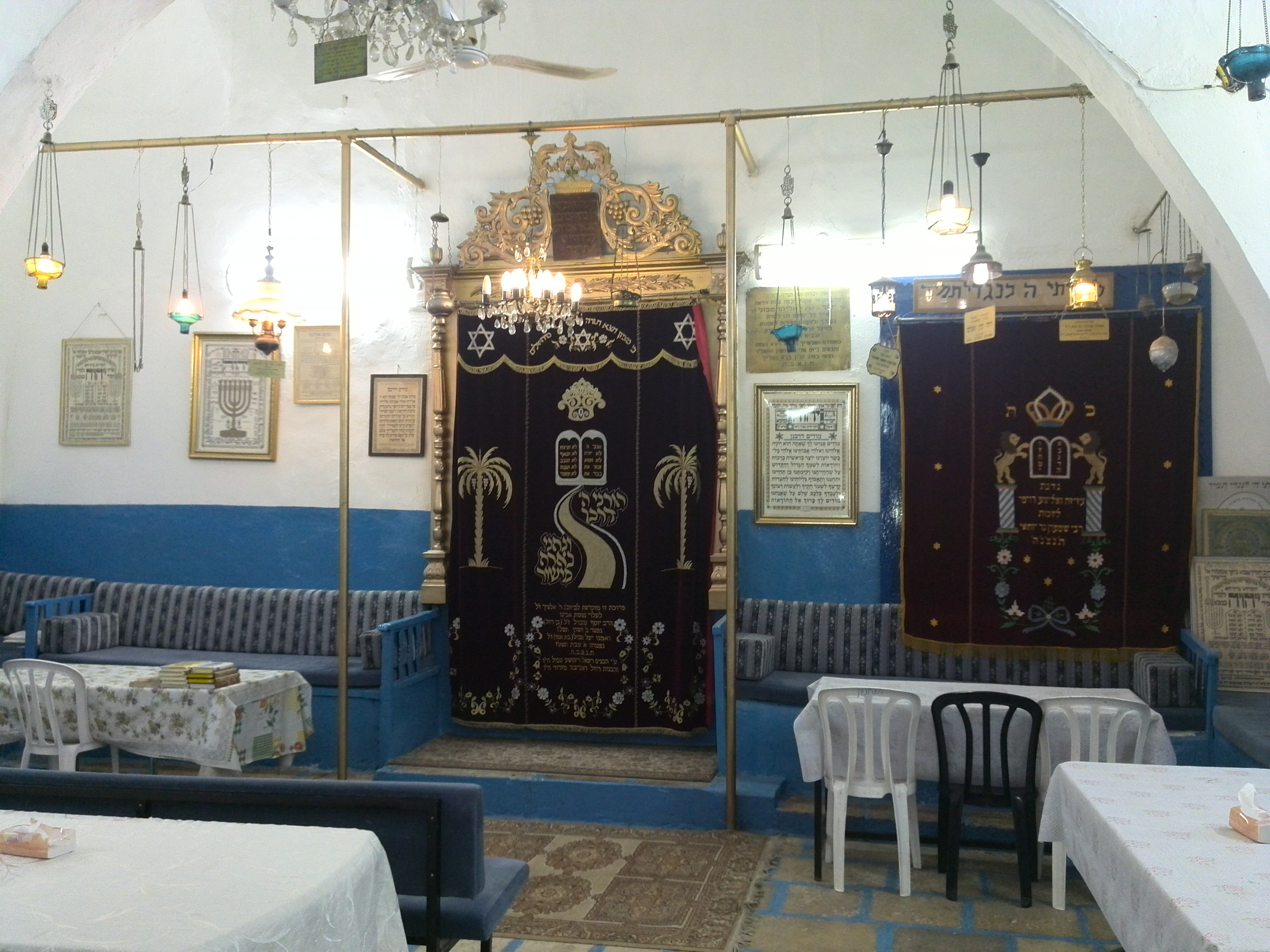 ארון הקודש בבית הכנסת על שם האלשיך בצפת